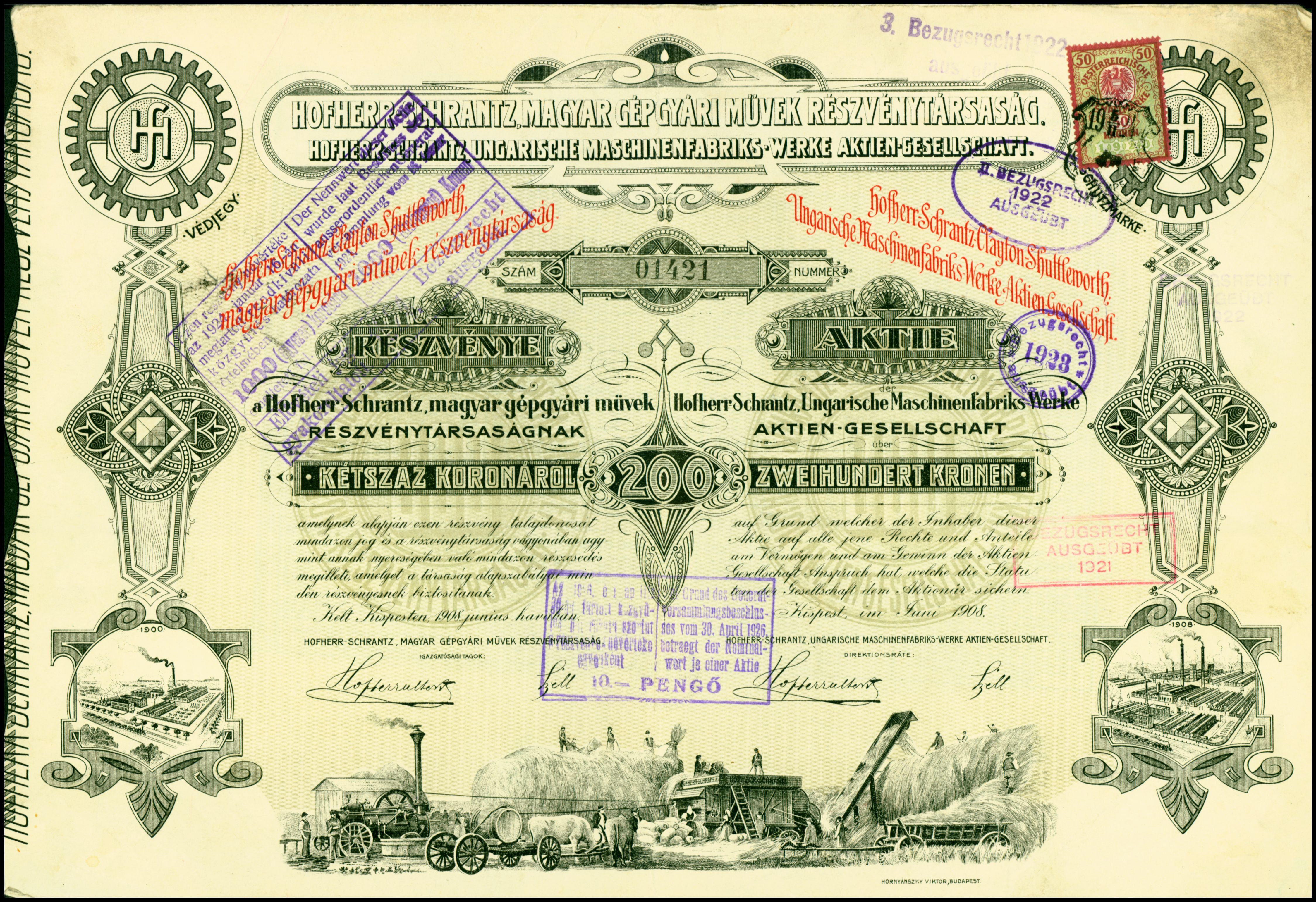 Aktie über 200 Kronen der Hofherr-Schrantz, Ungarische Maschinenfabriks-Werke AG vom Juni 1908; aus dem Fundus des Ersten Deutschen Historic-Actien-Museum e.V. (EDHAM), Kürnbach